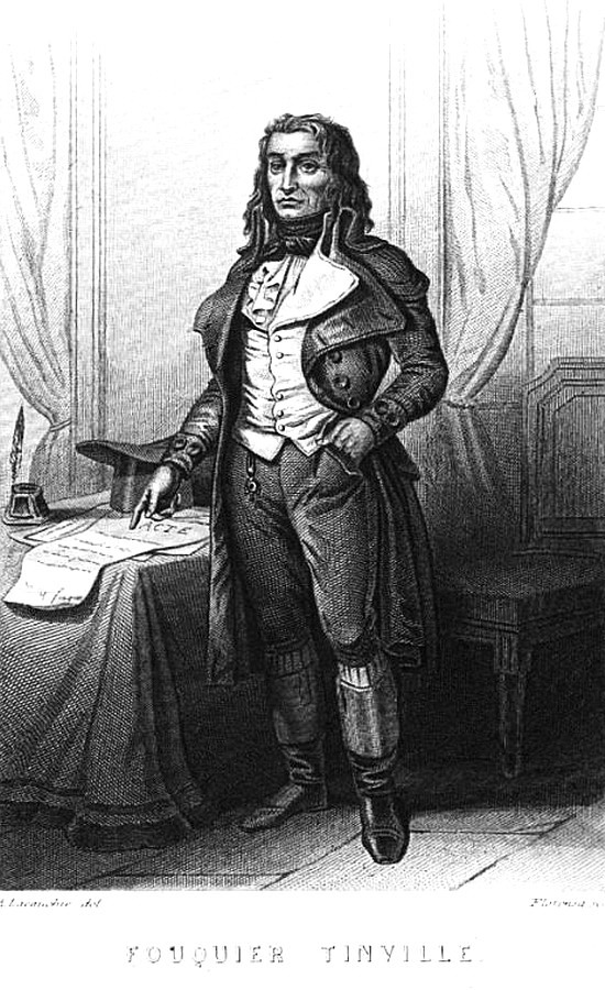 Portrait de Fouquier-Tinville